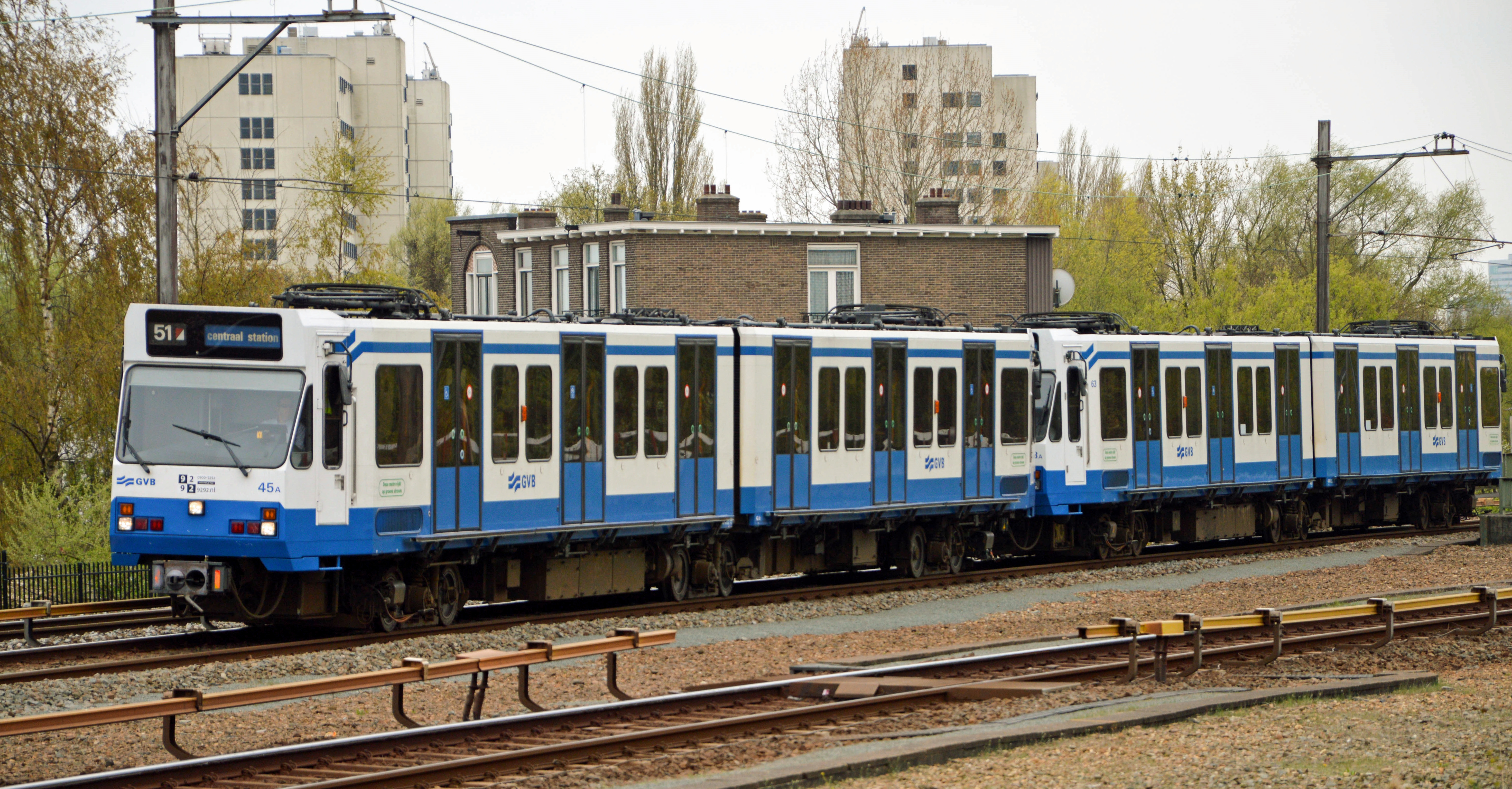 Persoonlijk vind ik dit lelijke metrostellen, ze staan zo hoog op de wielen.